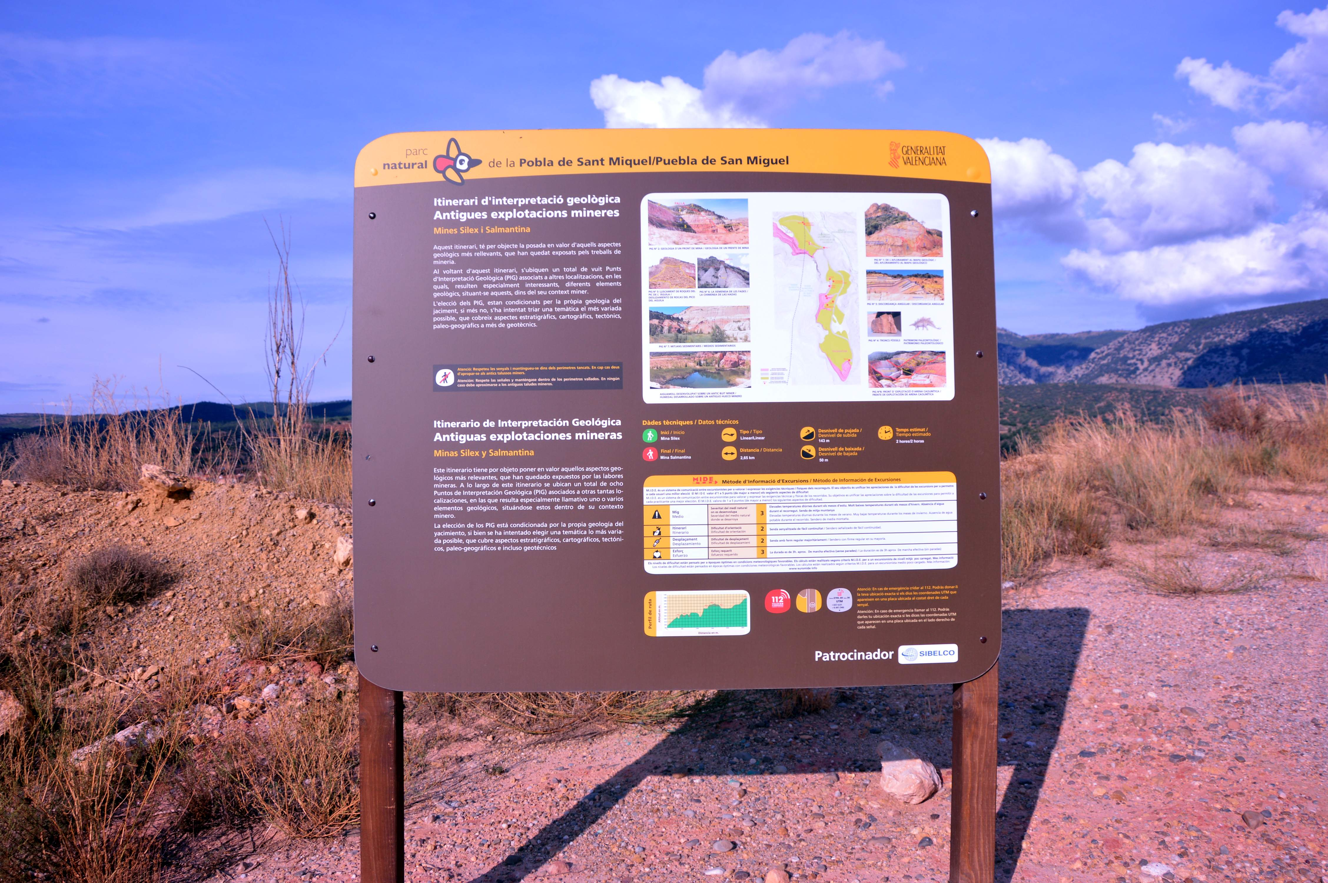 Detalle de panel en la Ruta Geológica del Parque Natural de Puebla de San Miguel (2017).